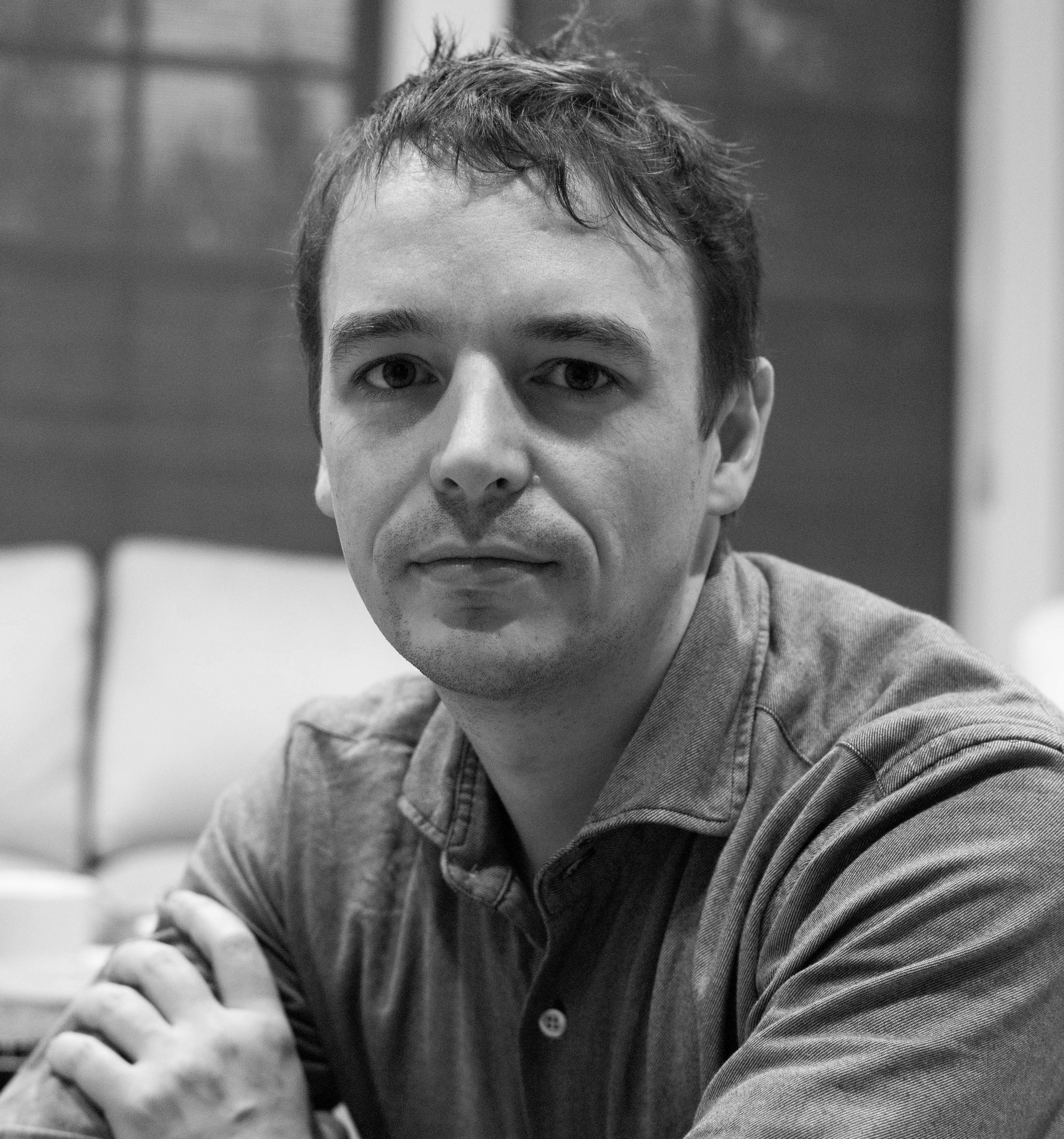 Joscha Bach, Cambridge, 2013-11-11